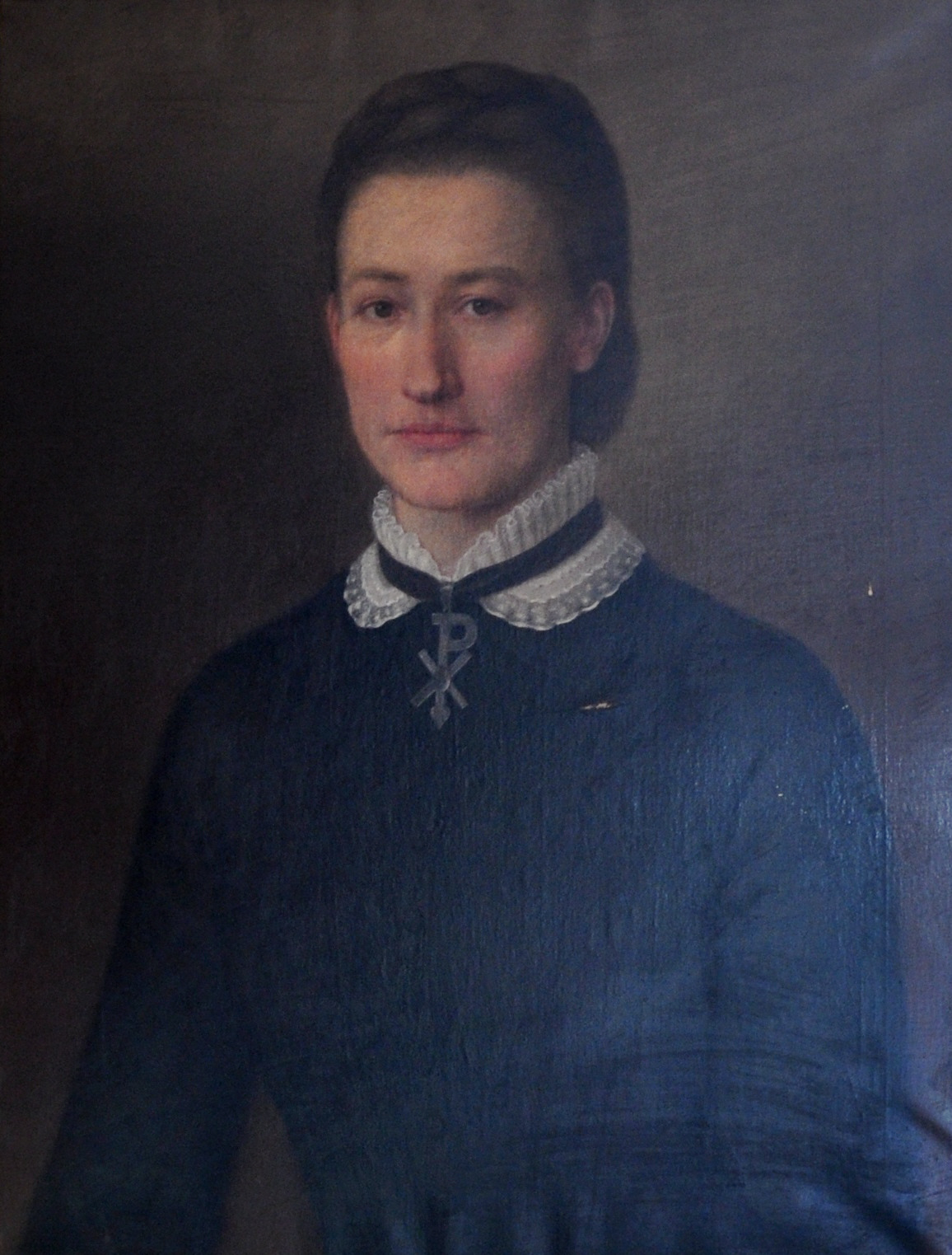 Burg Waldburg (Württemberg), Porträt Sophie Gräfin von und zu Arco-Zinneberg (1836–1909), Ehefrau des Franz Xaver Fürst von Waldburg-Wolfegg und Waldsee (1833–1906)